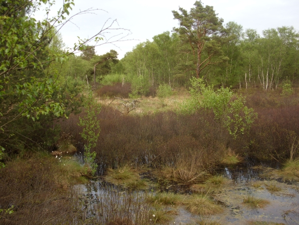 Naturschutzgebiet „Holler- und Wittemoor“